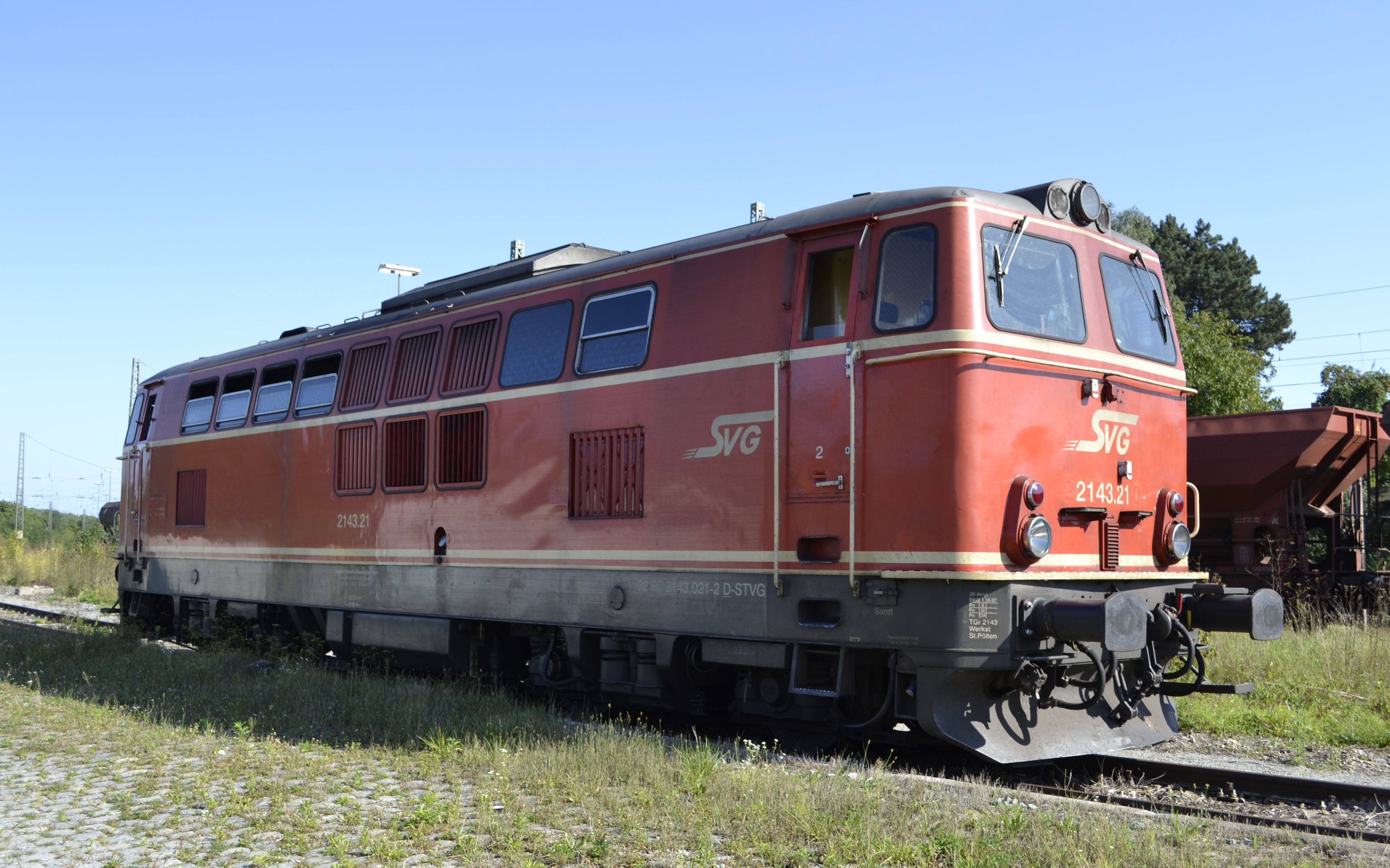 Eine ÖBB 2143.21 der Staudenbahn in Vilshofen an der Donau.